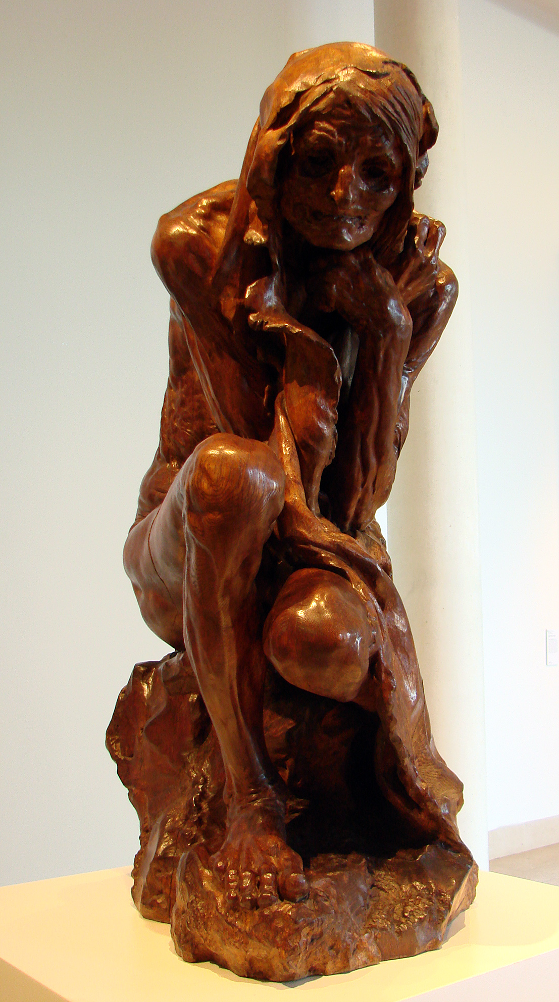 La Misère (1896), par Jules Desbois (1851-1935), chêne sculpté. Musée des Beaux-Arts de Nancy.